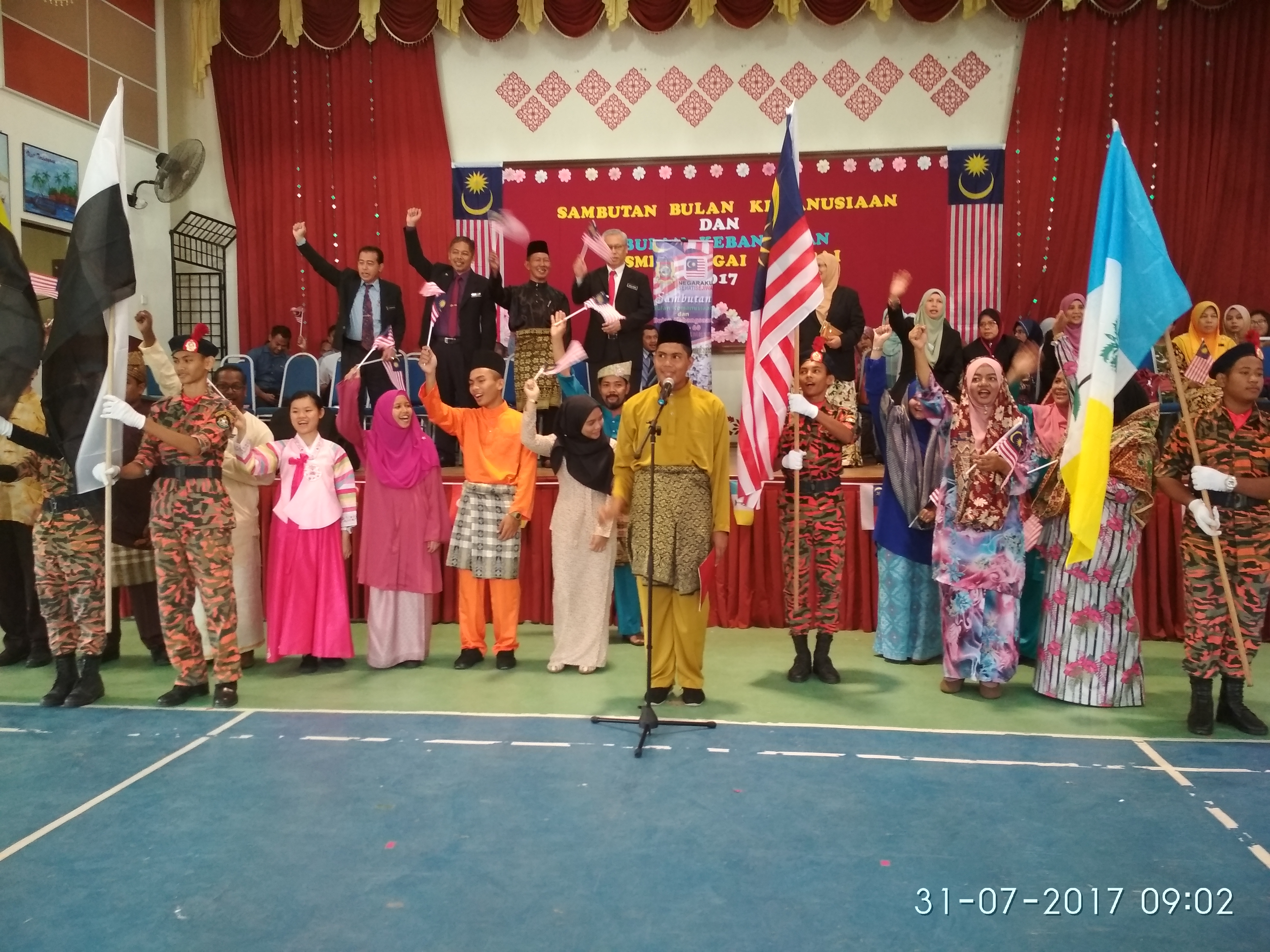 sketsa ucapan pengisytiharaan kemerdekaan DGN LAUNGAN MERDEKA